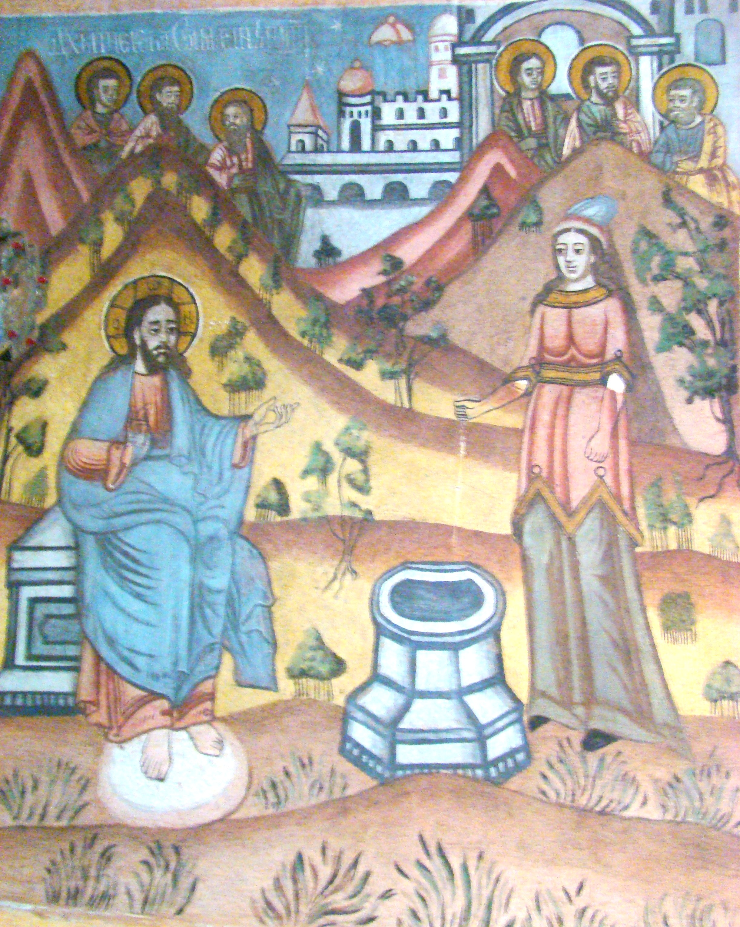 Biserica „Buna Vestire" din Jina, județul Sibiu